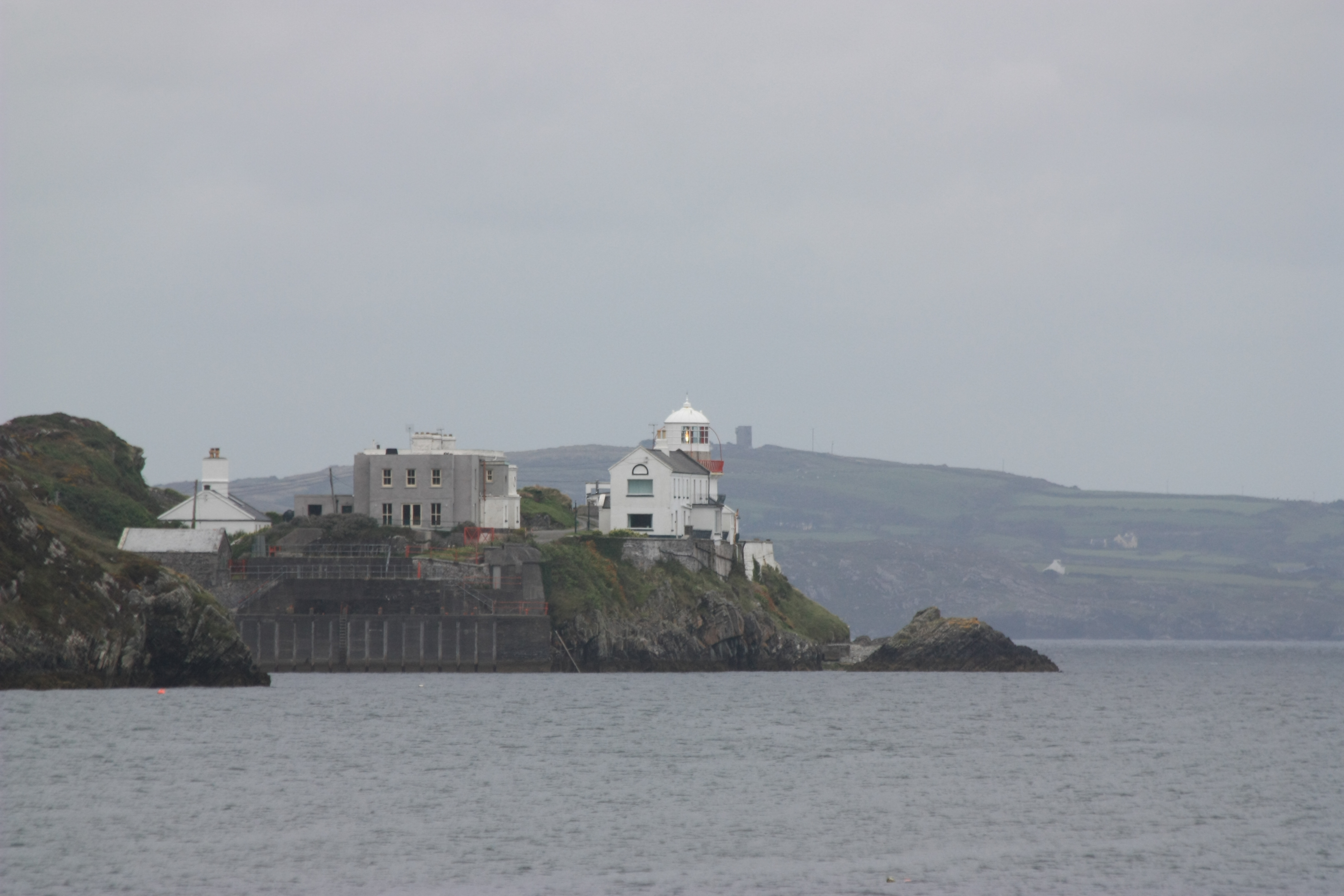 En activité, mais transformé en cottage...